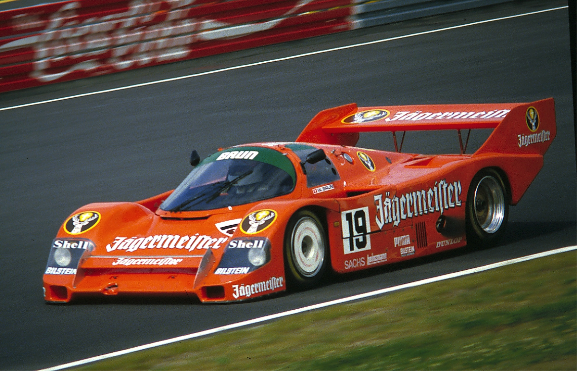 Porsche 956 1985 mit Walter Brun auf der Zielgeraden des Nürburgrings